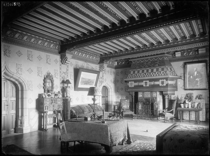 Burg La Rochepot in Burgund, Zimmer des Burgherrn